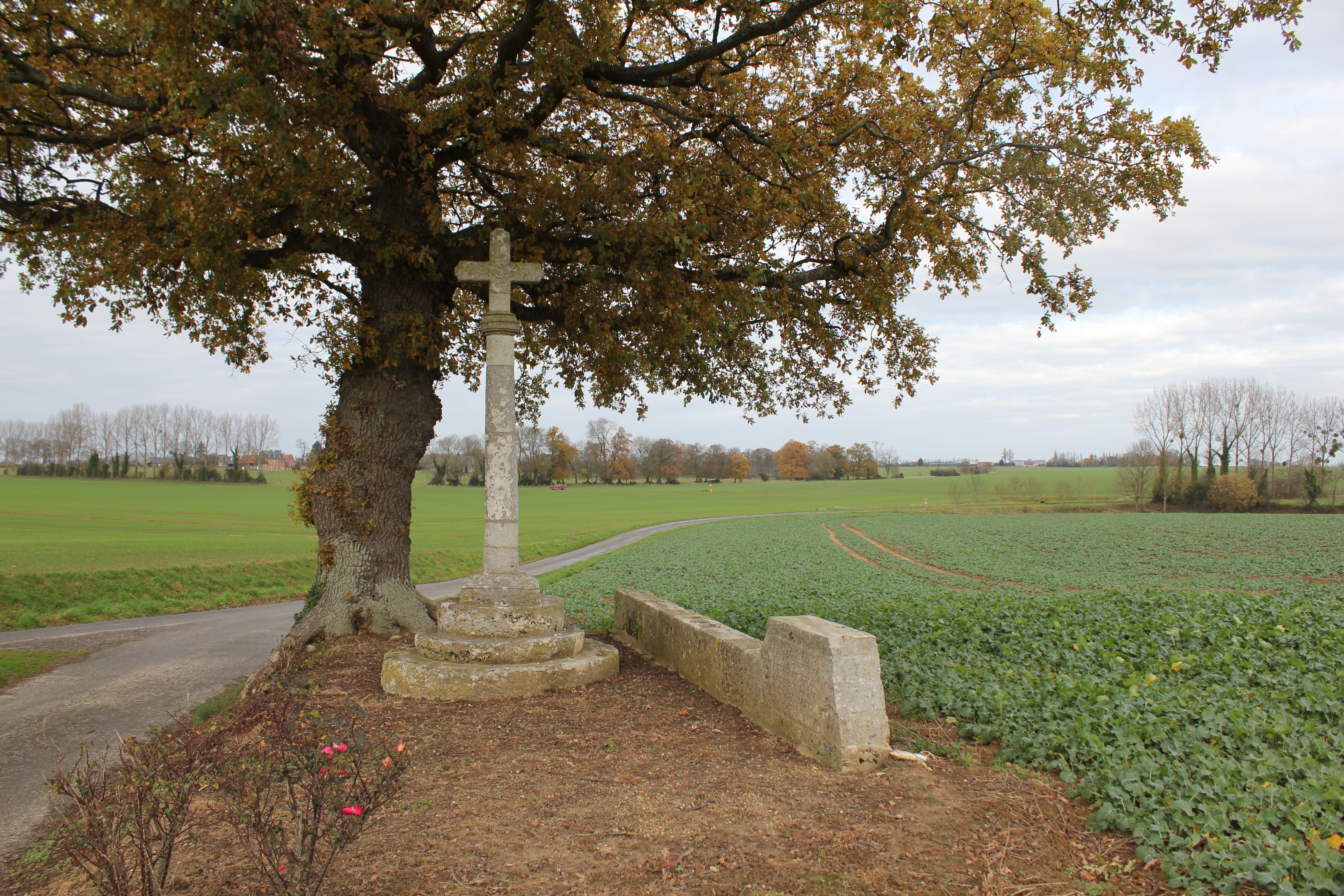 Manneville-sur-Risle Croix de Bonneboscq.